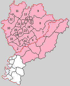 愛知県南設楽郡の町村制時点の町村。